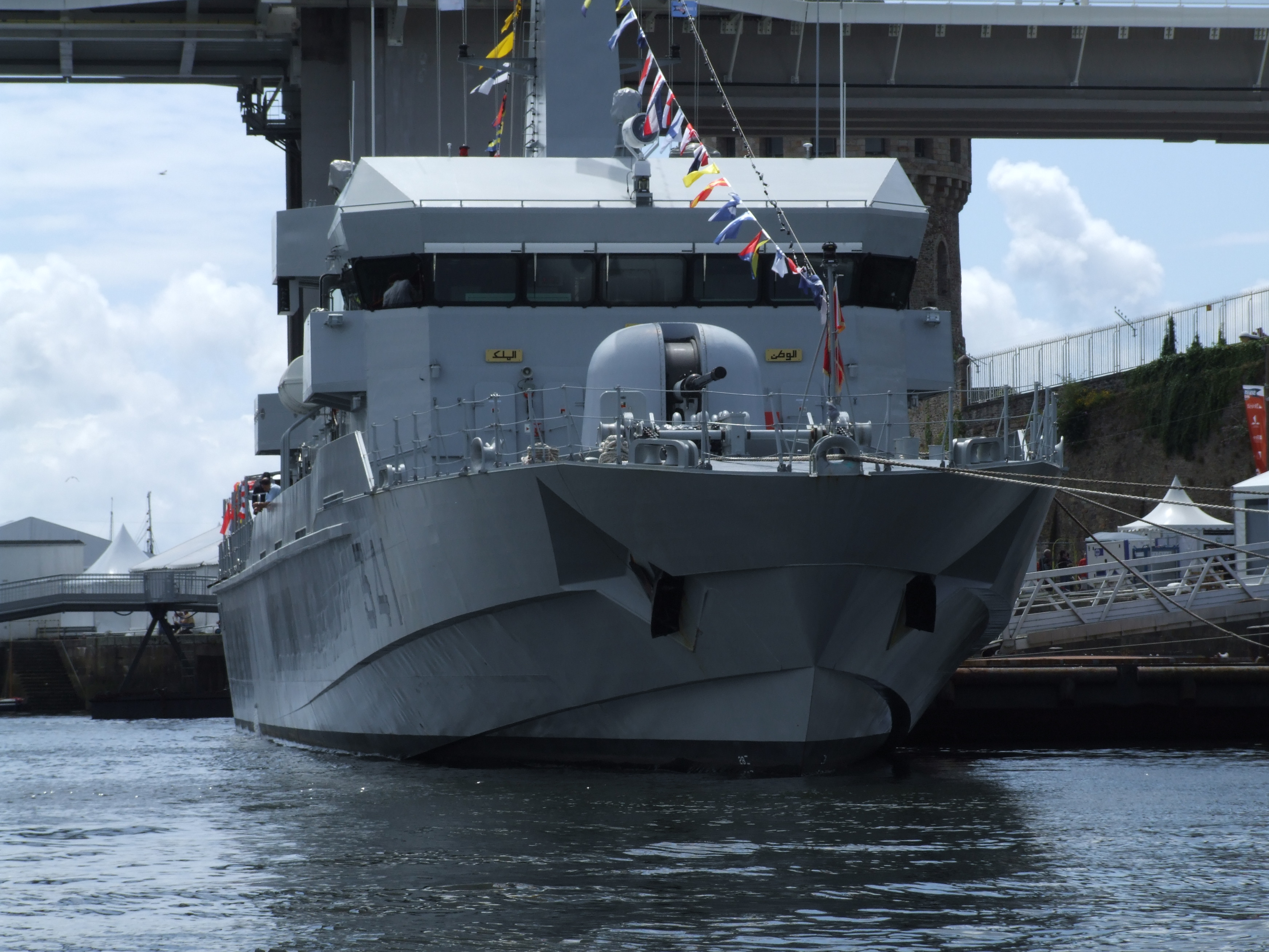 Les Tonnerres de Brest 2012 : Bir anzarane